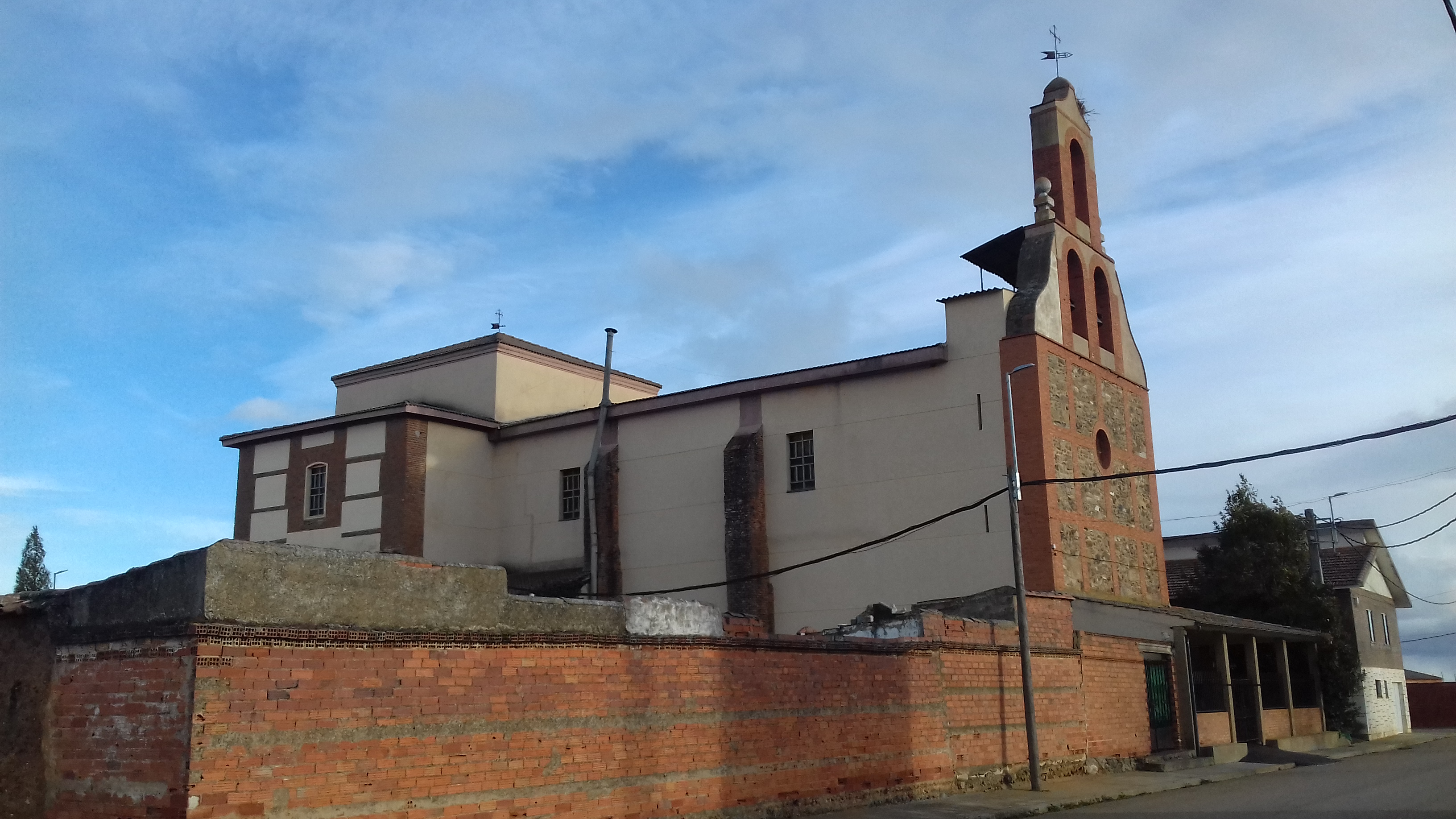 Iglesia de Pobladura de Pelayo García